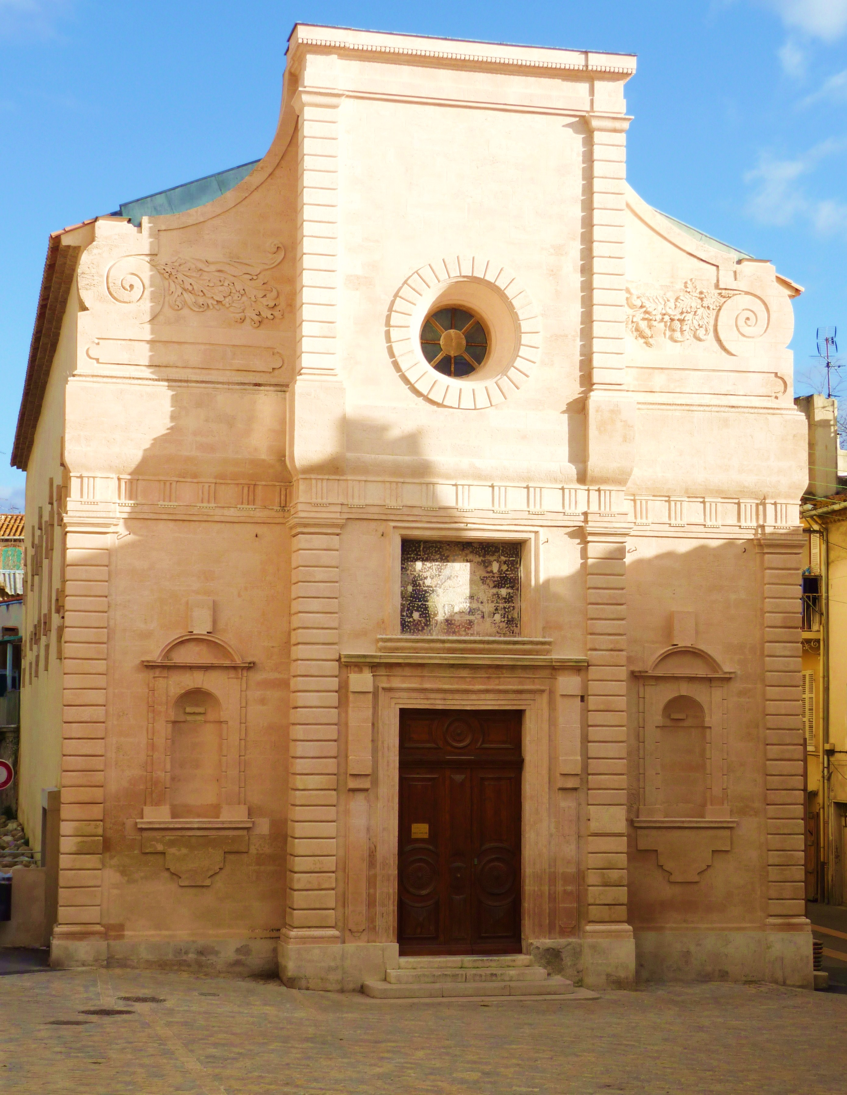 La Ciotat, France : chapelle St Anne construite par les Pénitents Noirs à partir de 1630 (après restauration)